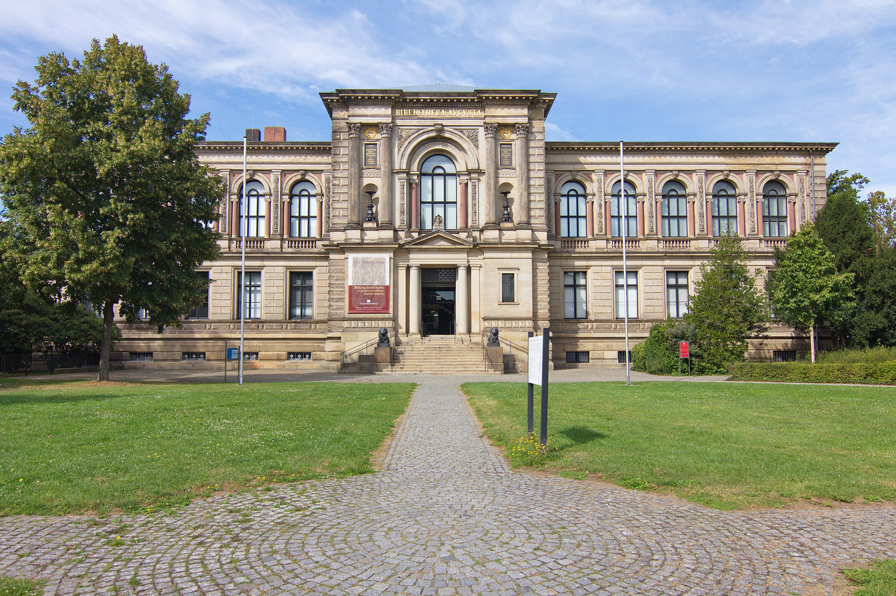 Die 1572 gegründete Herzog August Bibliothek wurde im 17.Jhd. als das achte Weltwunder bezeichnet.